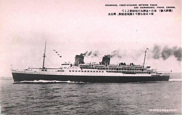 関釜連絡船 興安丸